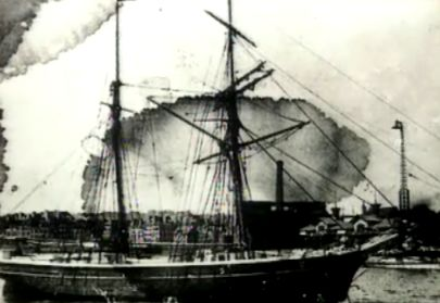 Skonnerten «Casper» i 1918 eller tidligere.